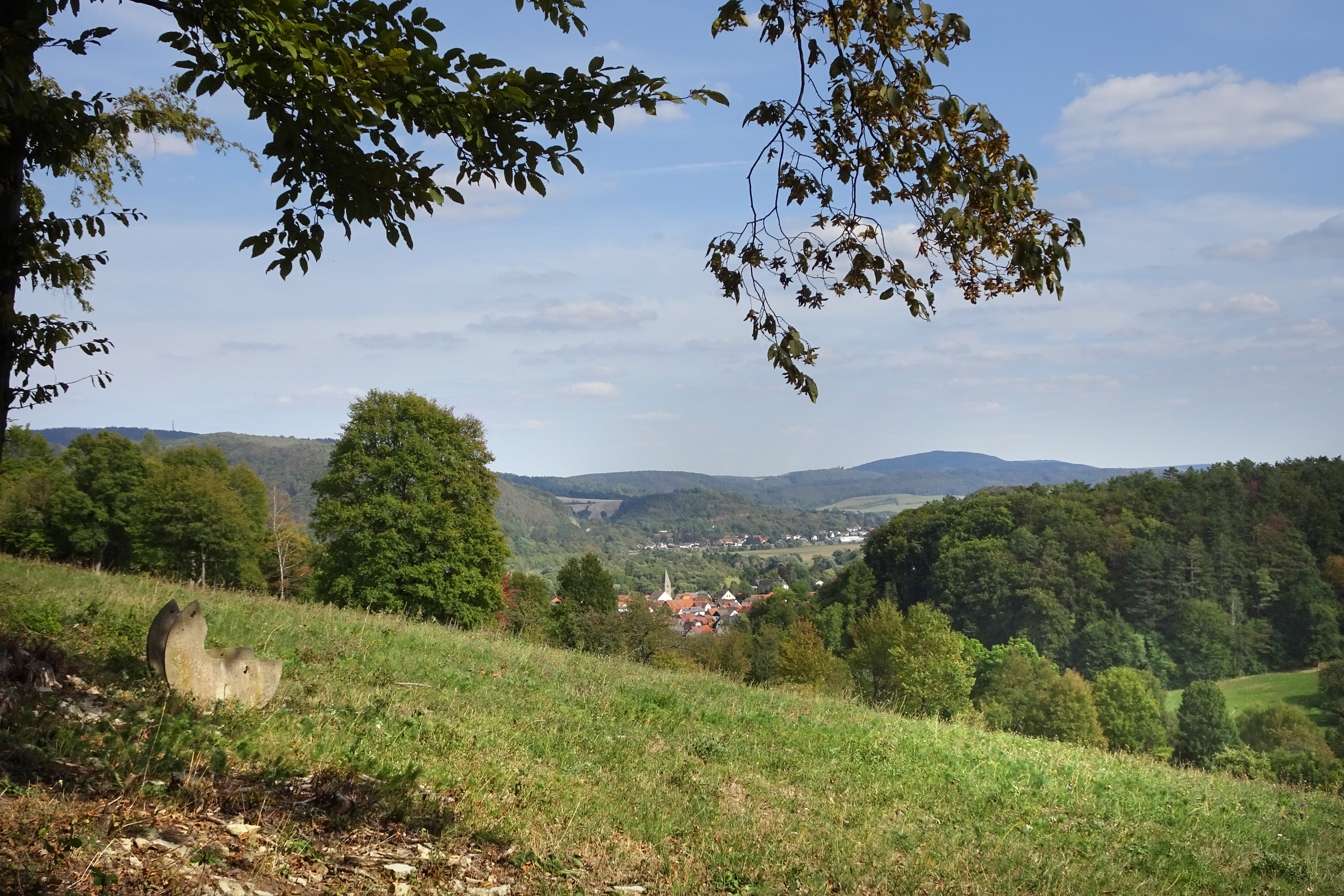 Der „Ermschwerder Heegen“ ist eine, in das untere Tal der Werra hineinragende Erhebung aus Muschelkalk im nordhessischen Werra-Meißner-Kreis. Er erstreckt sich über eine Höhenlage von 132 bis 235 m und besteht aus einem bewaldeten Bereich, einem Feuchtgebiet, Kalkmagerrasen, Streuobstbeständen und landwirtschaftlich genutzten Flächen. Wegen seinem artenreichen Altholzbestand und einem großen Sumpfbiotop mit dem Vorkommen seltener Pflanzen-, Insekten- und Vogelarten wurde der „Heegen“ im Dezember 1985 als Naturschutzgebiet ausgewiesen und später, mit gleichen Gebietsgrenzen und Erhaltungszielen, als Flora-Fauna-Habitat-Gebiet Teil des europäisch vernetzten Schutzgebietssystems „Natura 2000“.